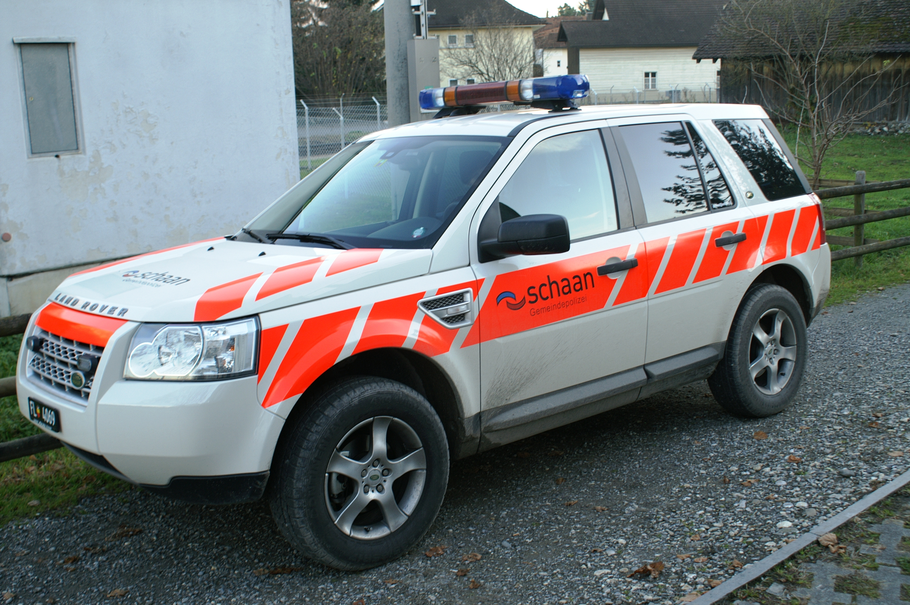 Liechtenstein politie auto (Gemeinde polizei Schaan)